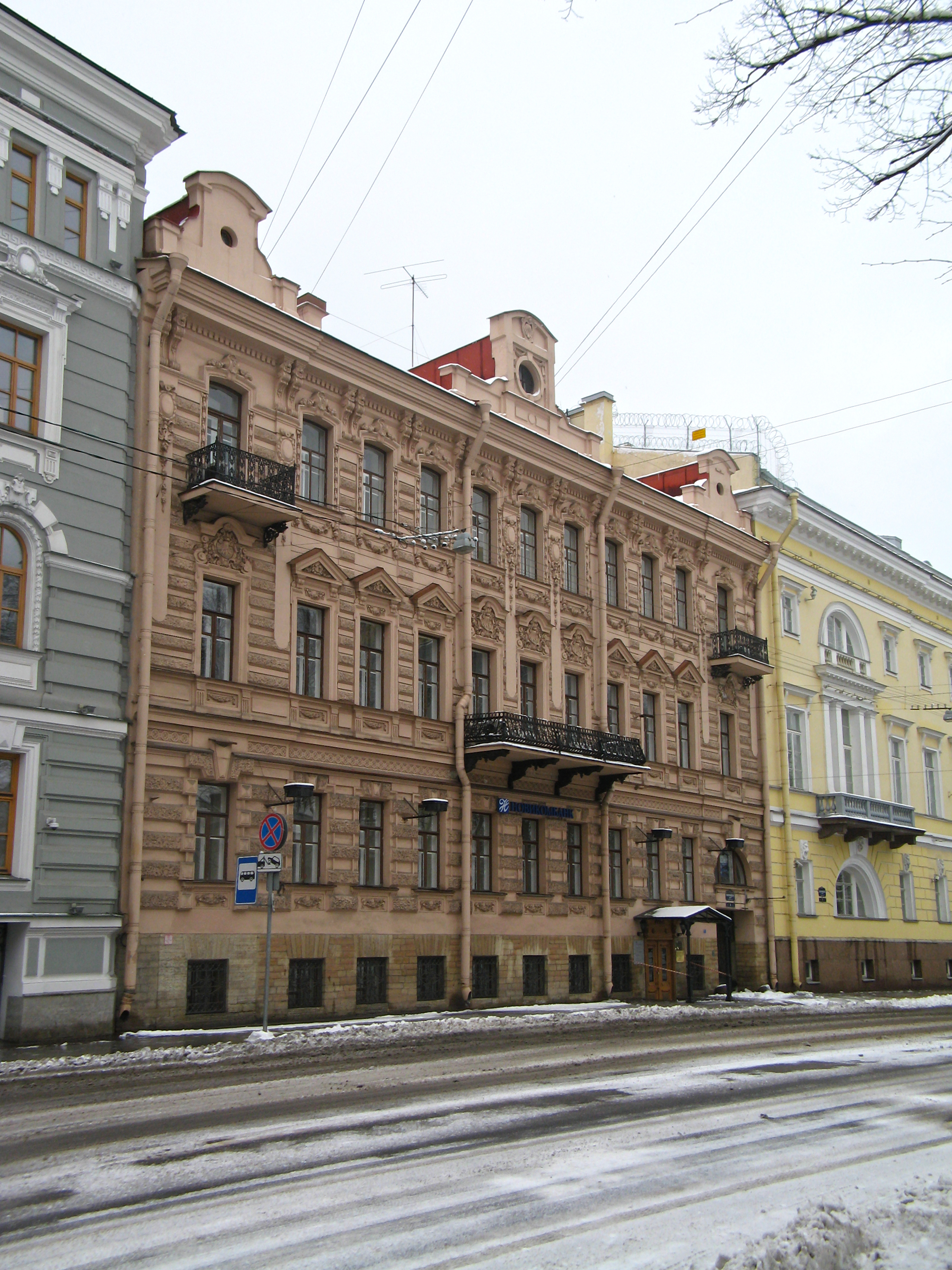 Дом военного инженера С.В. Яфимовича: Конногвардейский бульвар, 3, Адмиралтейский район, Санкт-Петербург